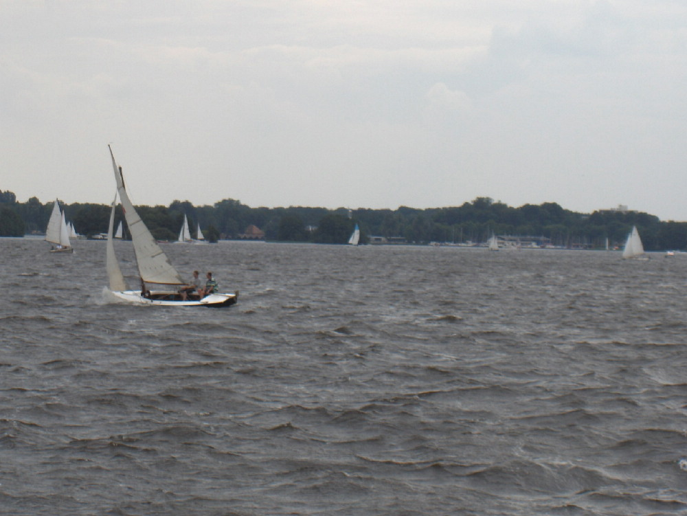 Paterswoldsemar fan de eastigge sjoen.